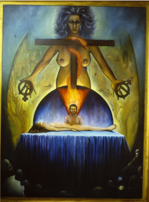 Le serpent crucifié, l'une des oeuvres préferer du peintre